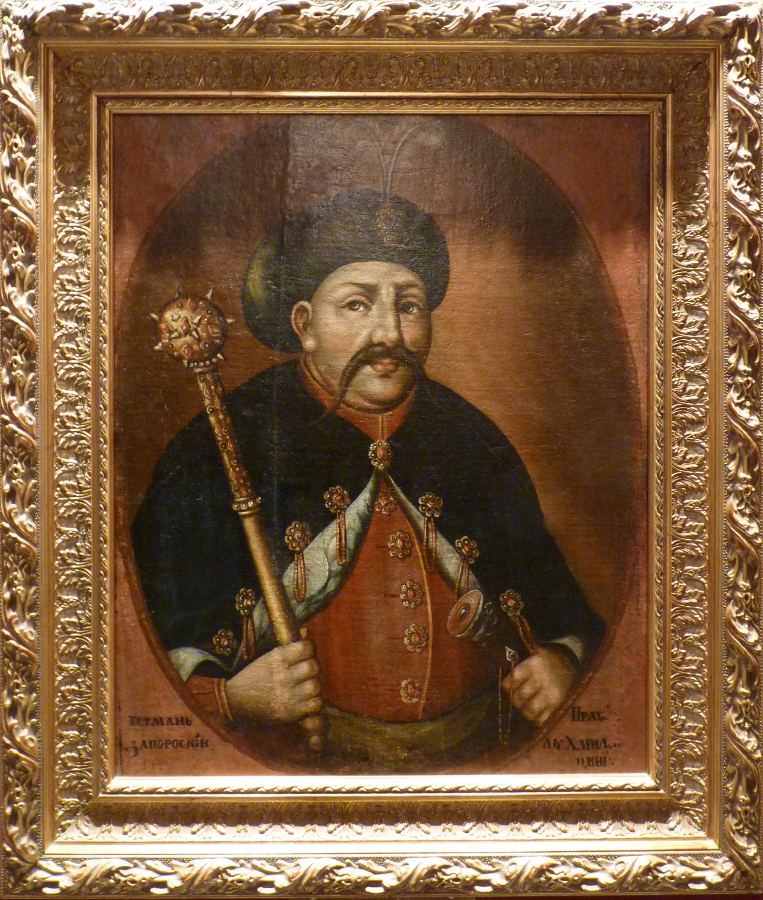 Портрет Богдана Хмельницького,художник невідомий, середина XVIII ст.